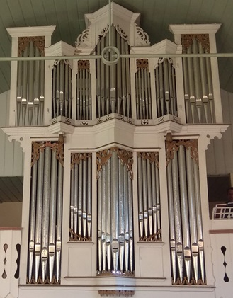 Historische Orgel in der evangelisch-reformierten Kapelle in Neuringe.